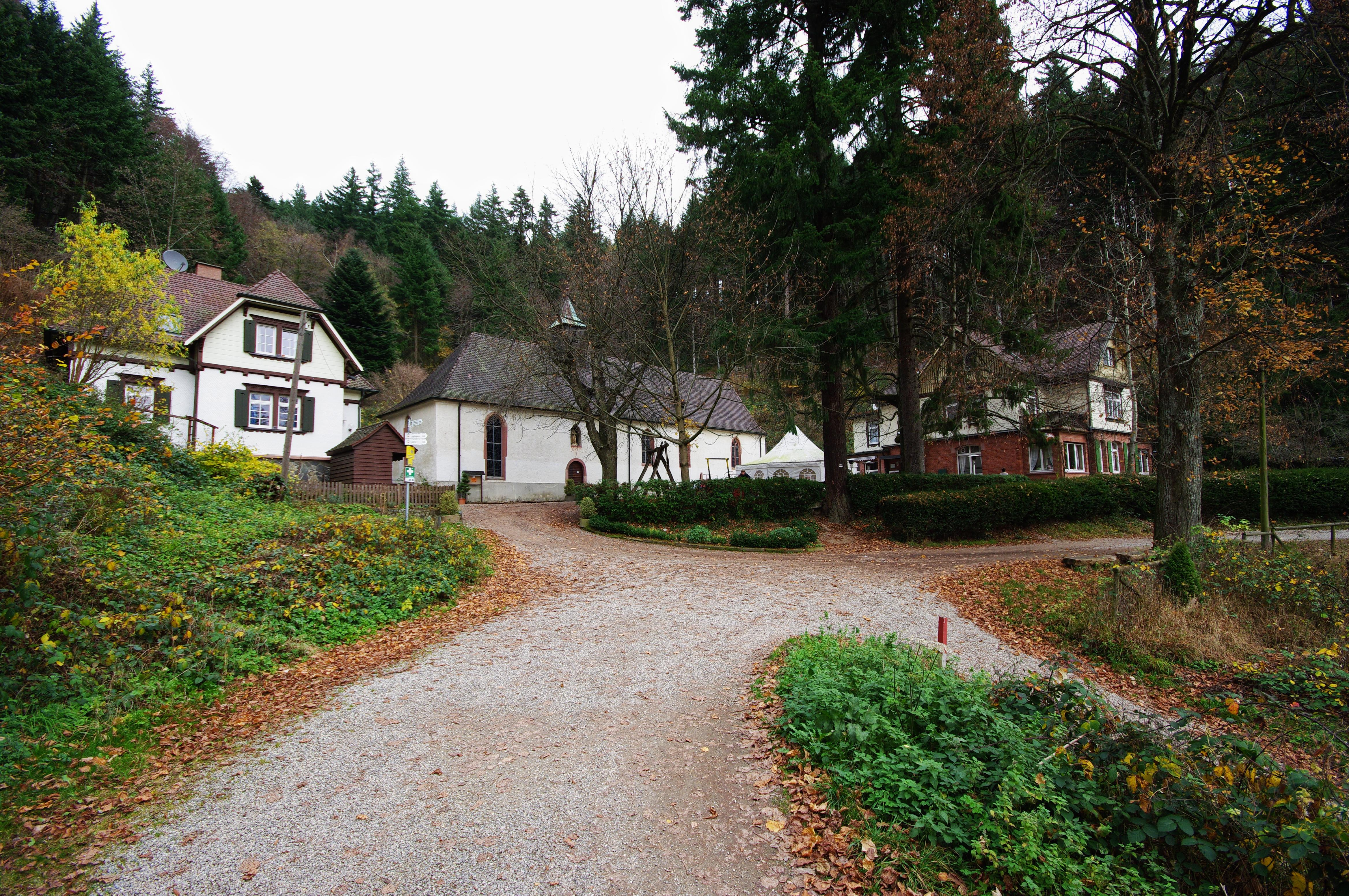 Bilder der Lokomotive 007 Baureihe 85 die im Besitz der Stadt Freiburg und auf der Höllentalbahn gefahren ist Gesamtgelände